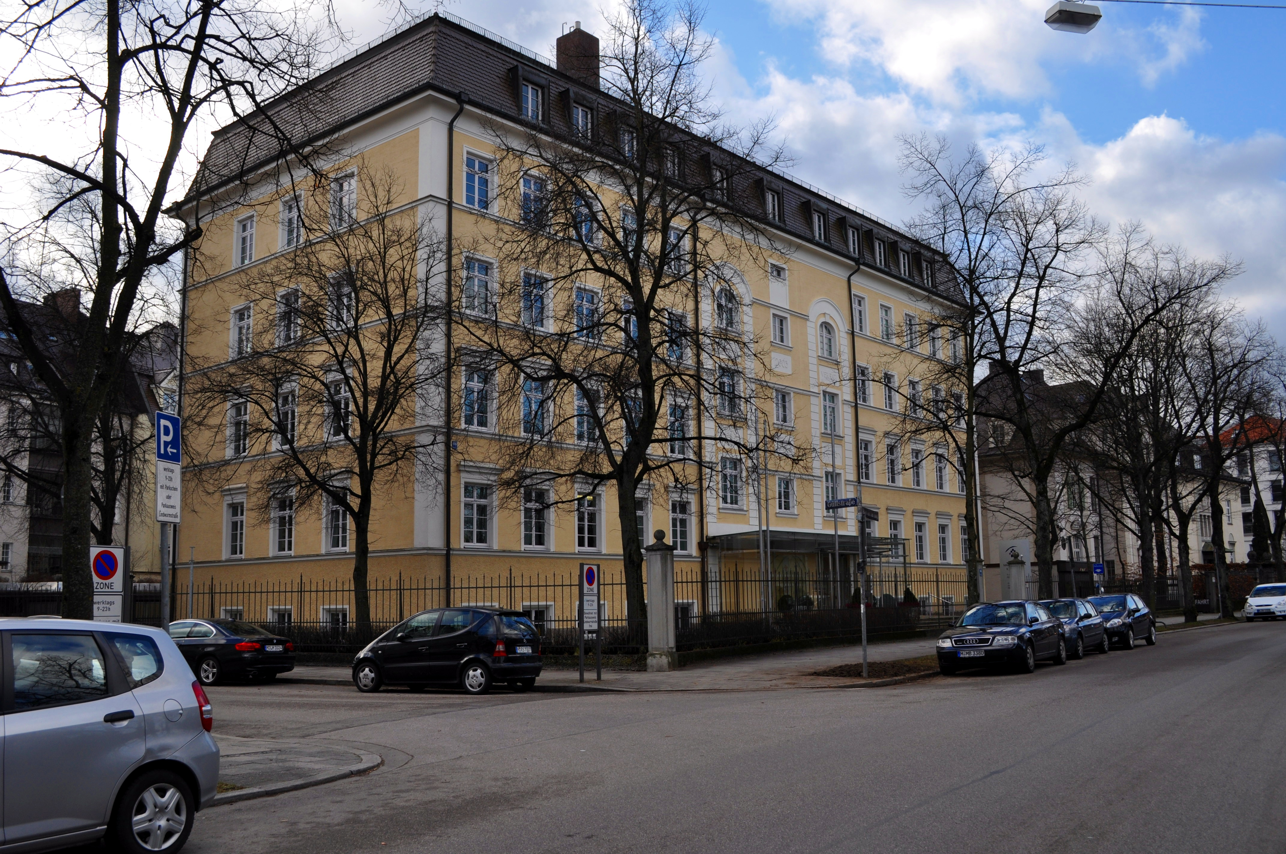 Maria-Theresia-Klinik in München-Ludwigsvorstadt; Bavariaring 46